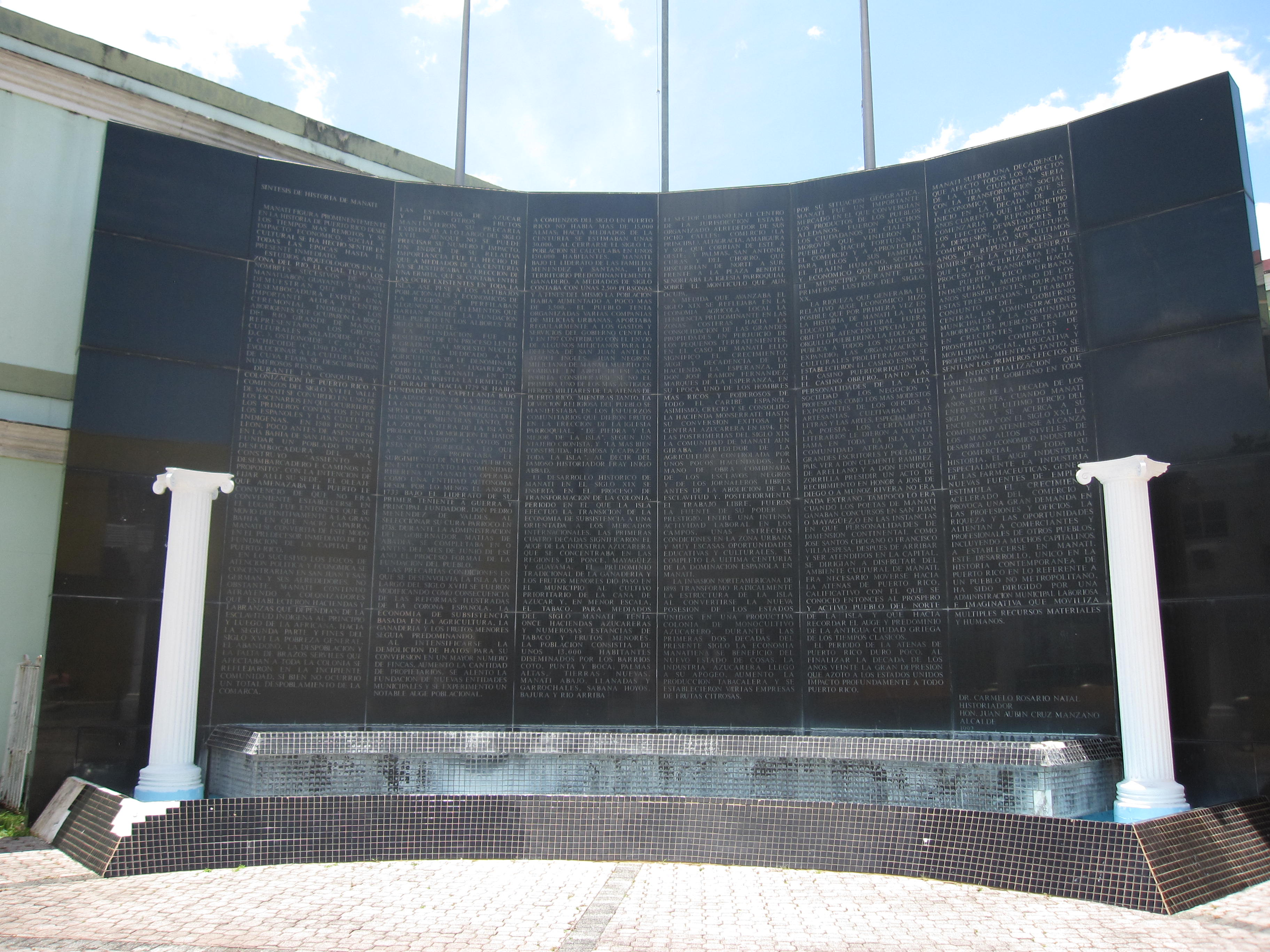 La Plaza de la Historia de Manatí en Manatí, Puerto Rico. Un resumen de la historia de Manatí escrita por el Dr. Carmelo Rosario Natal en un mural de granito.